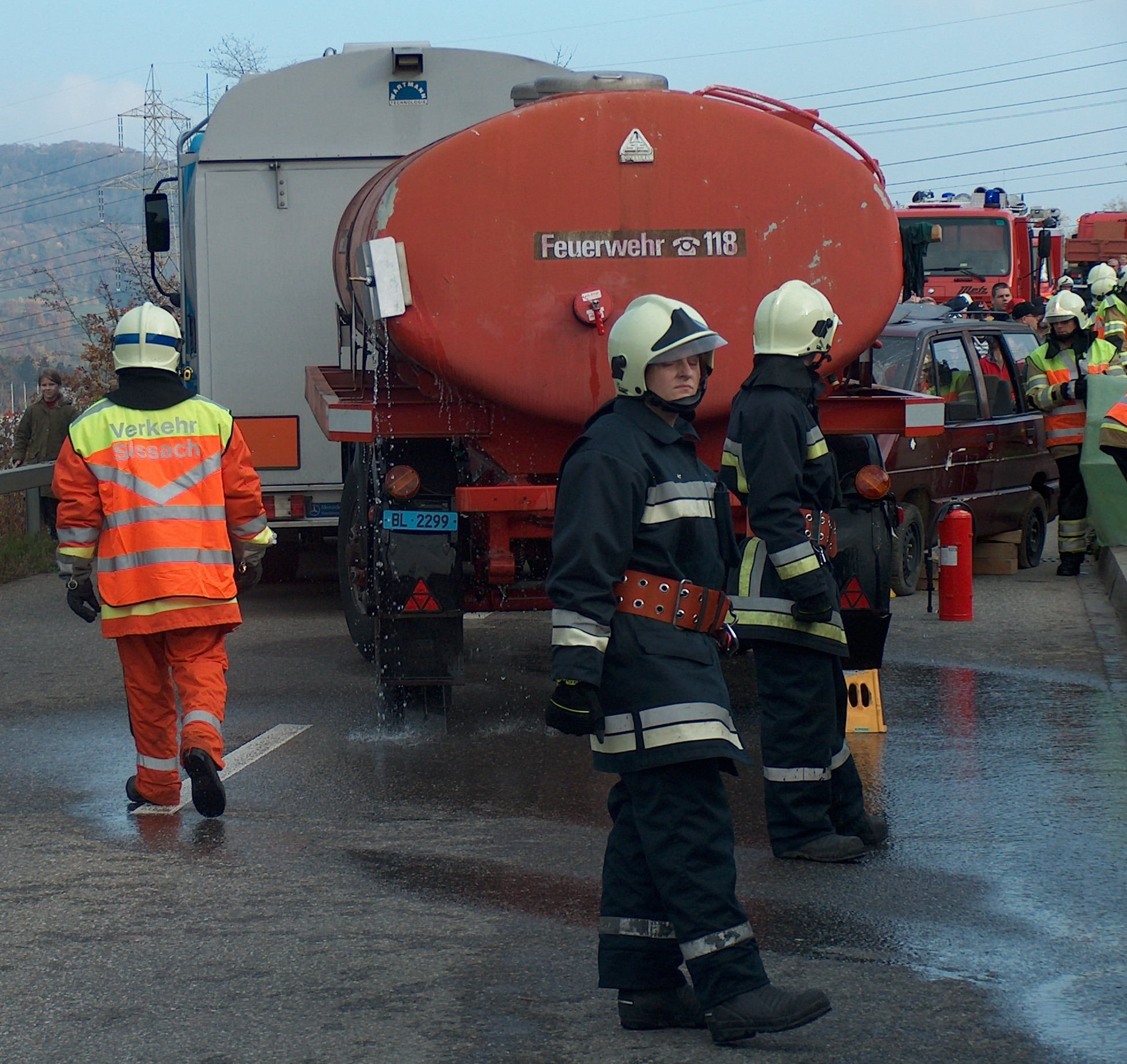 Supponierter Gefahrgutunfall (Benzin) an der Hauptübung "Senza Limiti" der Stützpunktfeuerwehren Liestal und Sissach, der Feuerwehr Lausen, der Betriebswehr der SBB, der Chemiewehr und des Katastrophenschutzes, in Lausen, Höhe alter Bahnhof/Güterterminal